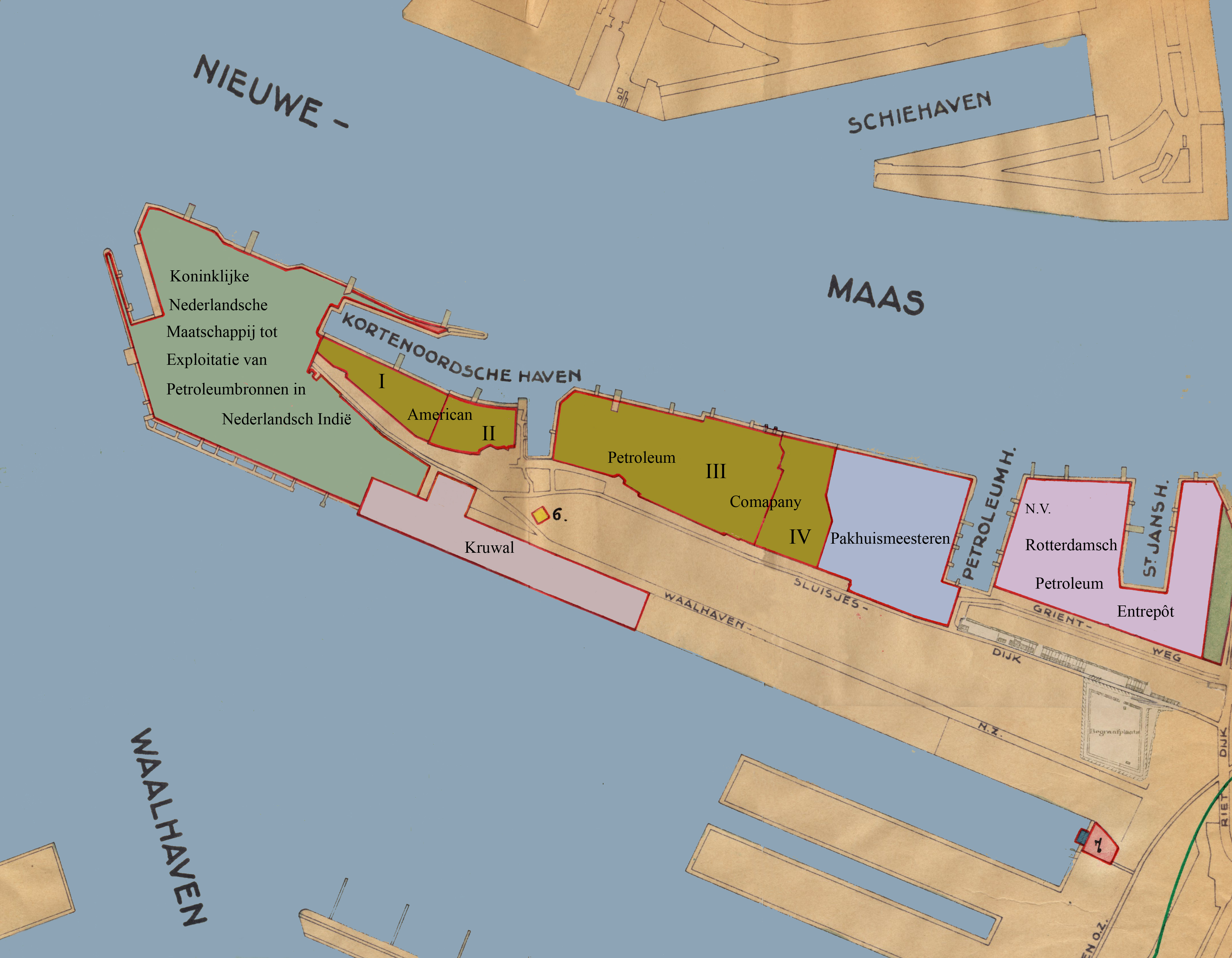 De terreinuitgiftesituatie van 1932 aan de Sluisjesdijk te Rotterdam. De nog zichtbare begraafplaats van Charlois en bebouwing tussen de Sluisjesdijk en de Grientweg, waren al verplaatst (1924) respectievelijk gesloopt (tussen 1924 en 1932).